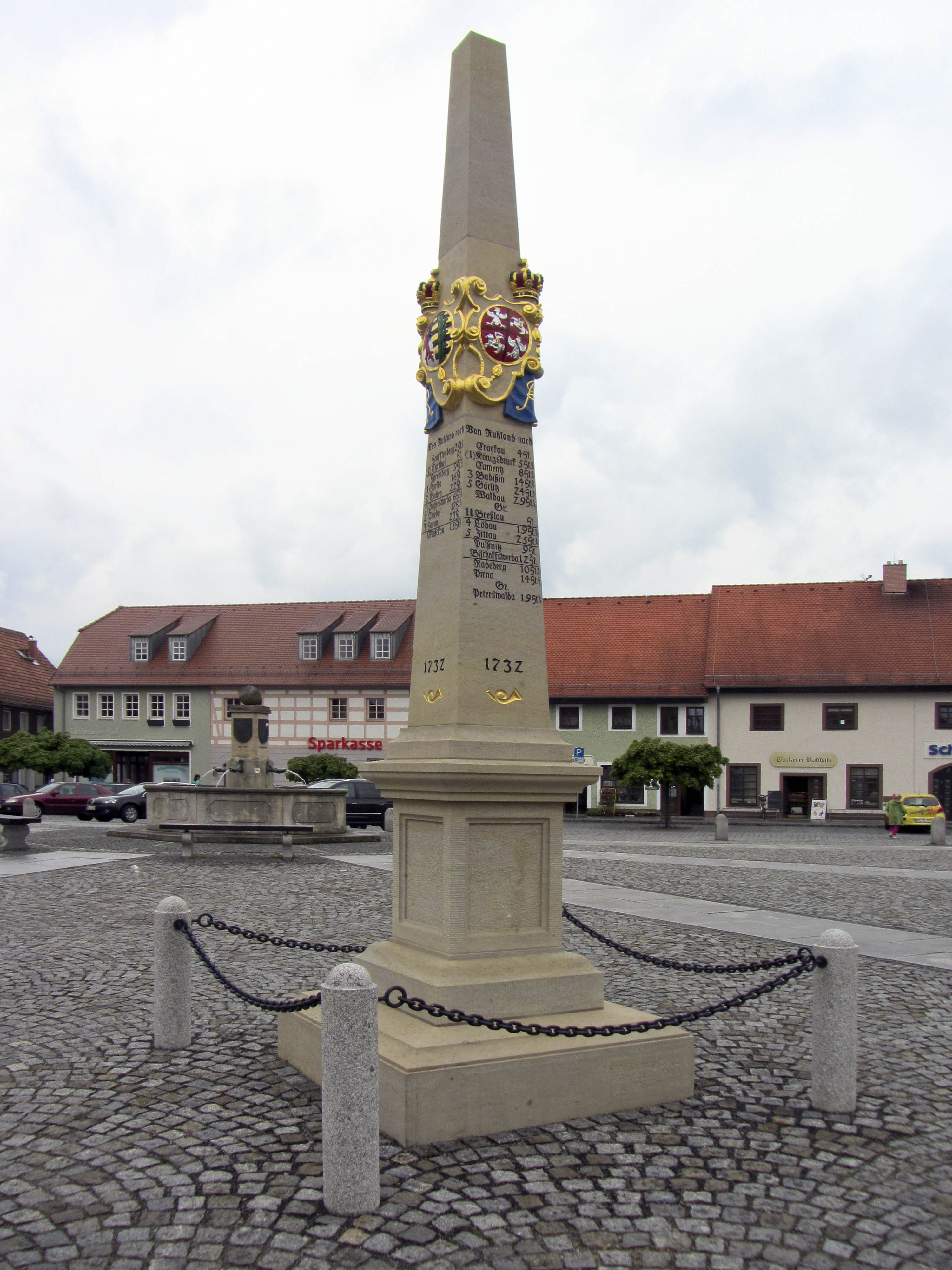 Kursächsischen Postmeilensäule-Distanzsäule in Ruhland auf dem Marktplatz